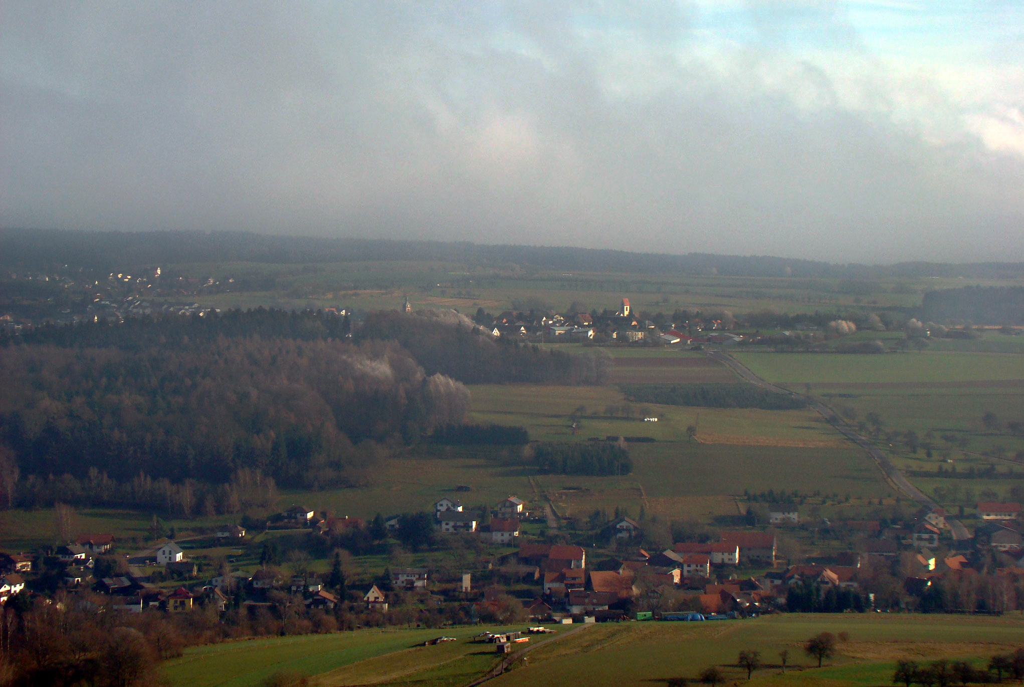 Blick vom Katzenbuckel über Waldbrunn